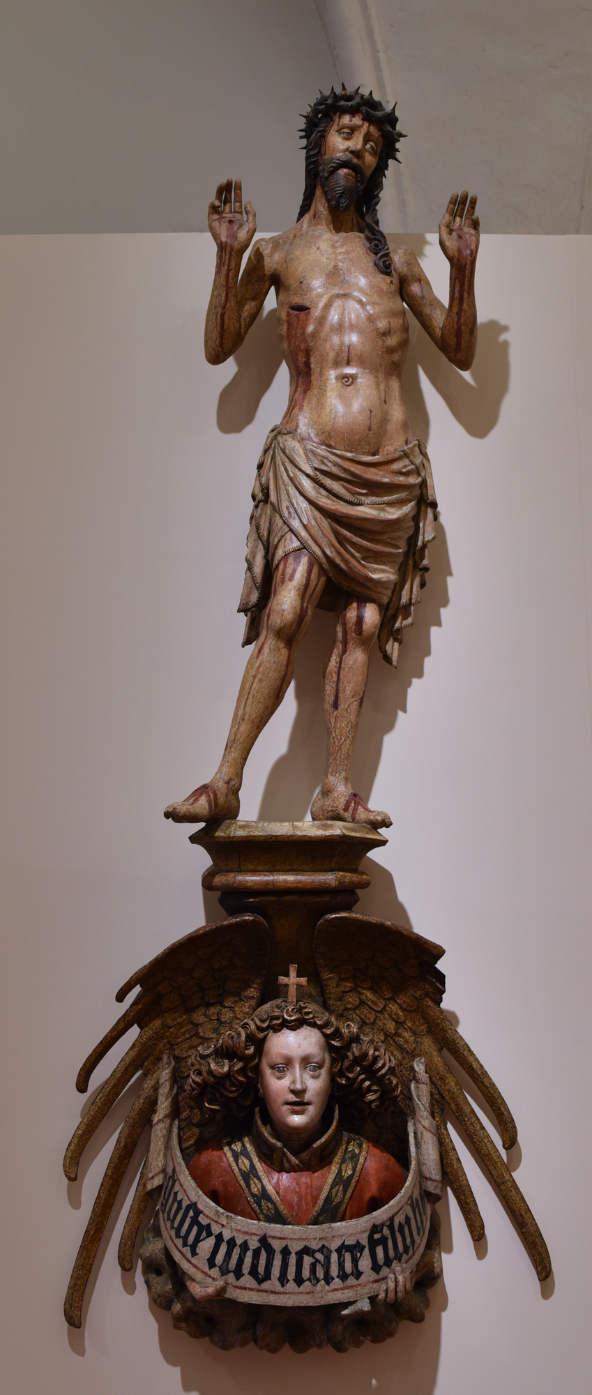 Bolestný Kristus ze Staroměstské radnice, Mistr Týnské Kalvárie (po 1419)